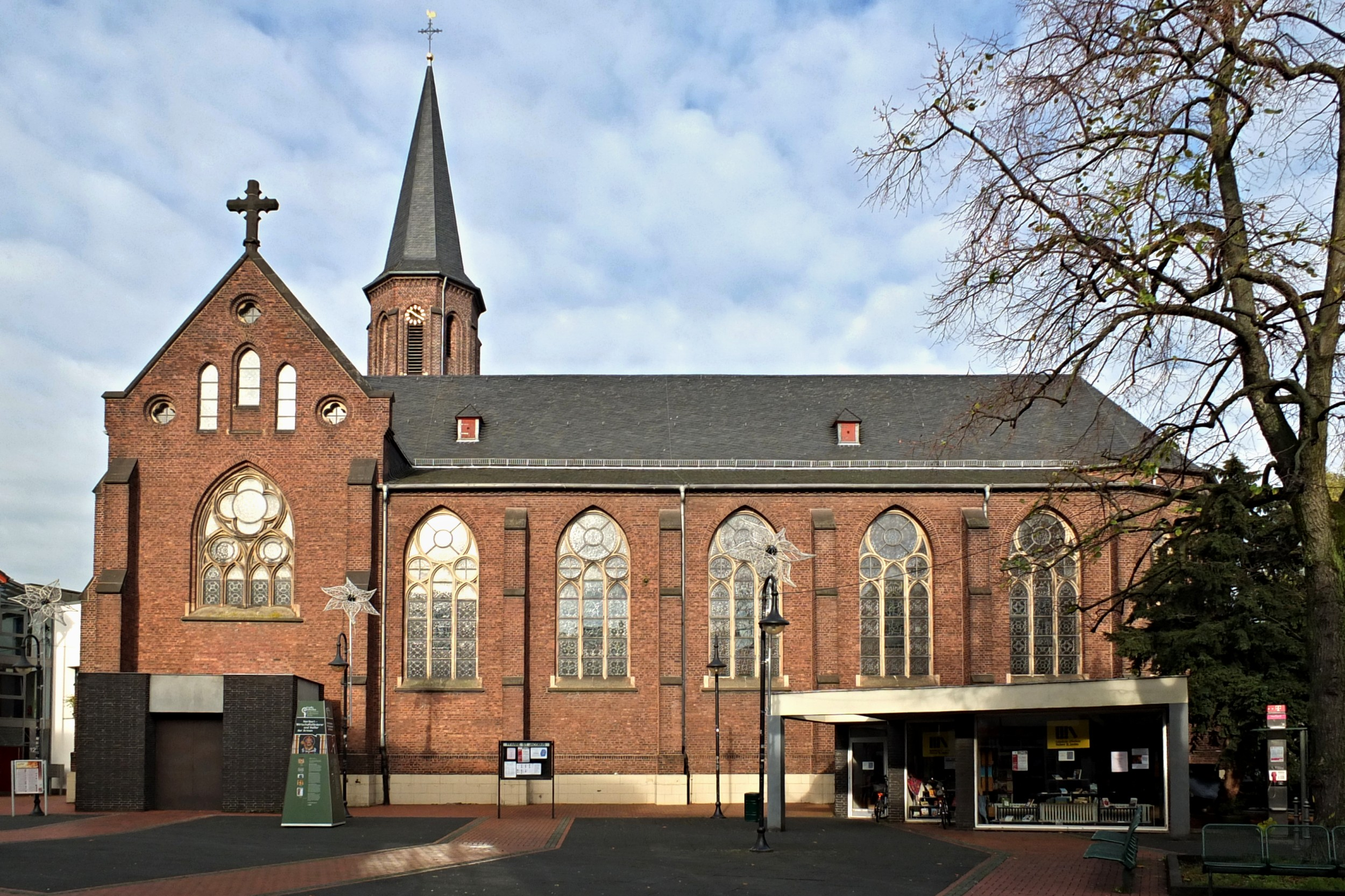 Sankt-Jakobus-Kirche, Hilden, Mittelstraße 10 This is a photograph of an architectural monument.